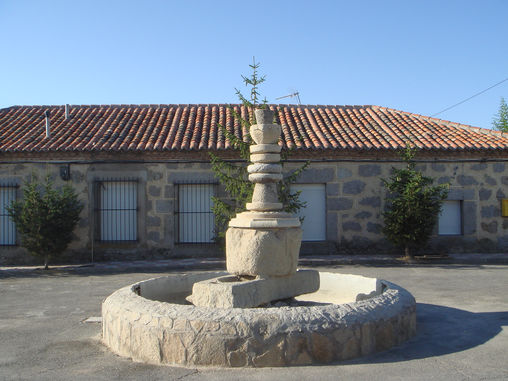 Fuente con piedras antiguas. (brocales de pozo, ruedas de molino etc), La Torre (Ávila), España.